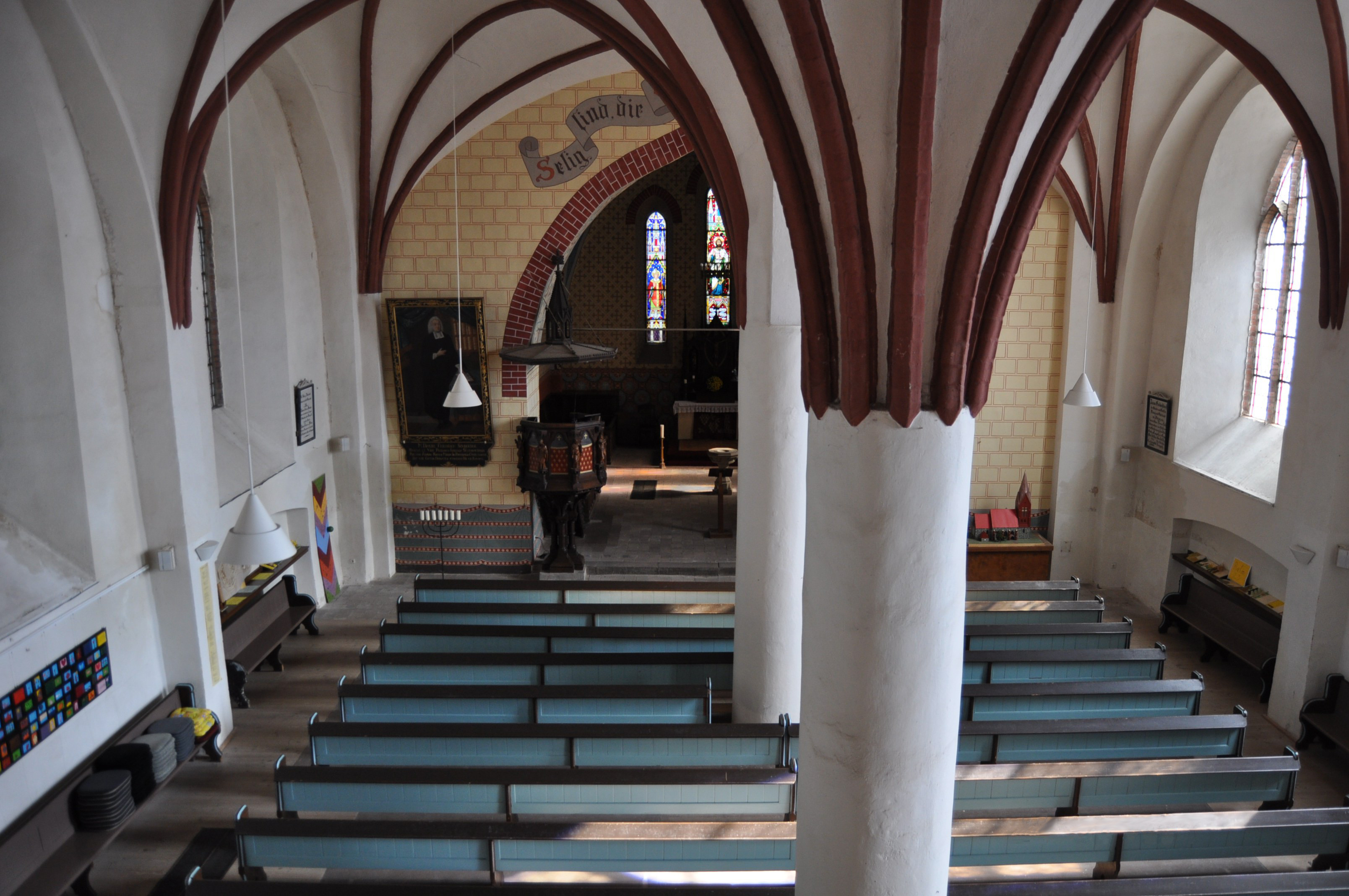 Nikolaikirche Gützkow - Blick von der Orgelempore